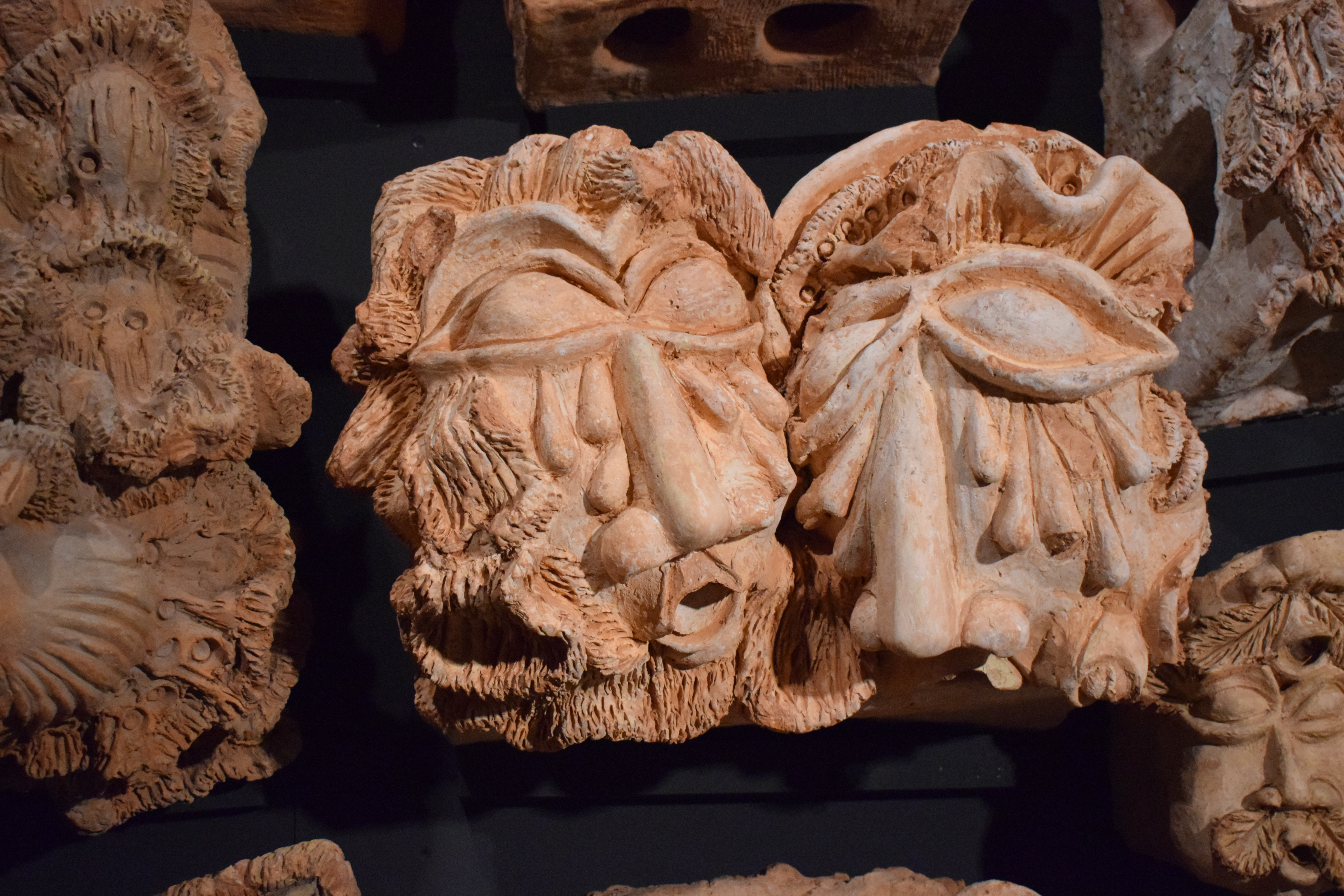 Vue de la Collection de l'art brut à Lausanne, dans le canton de Vaud en Suisse.